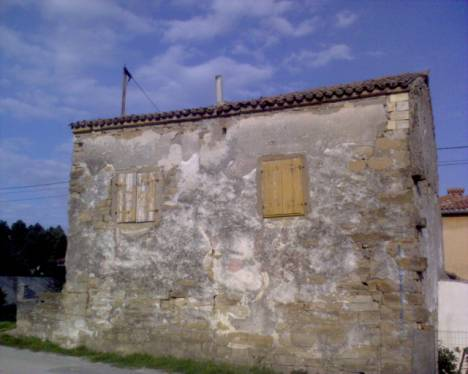 luka pirker, nastalo v šmarjah leta 2007